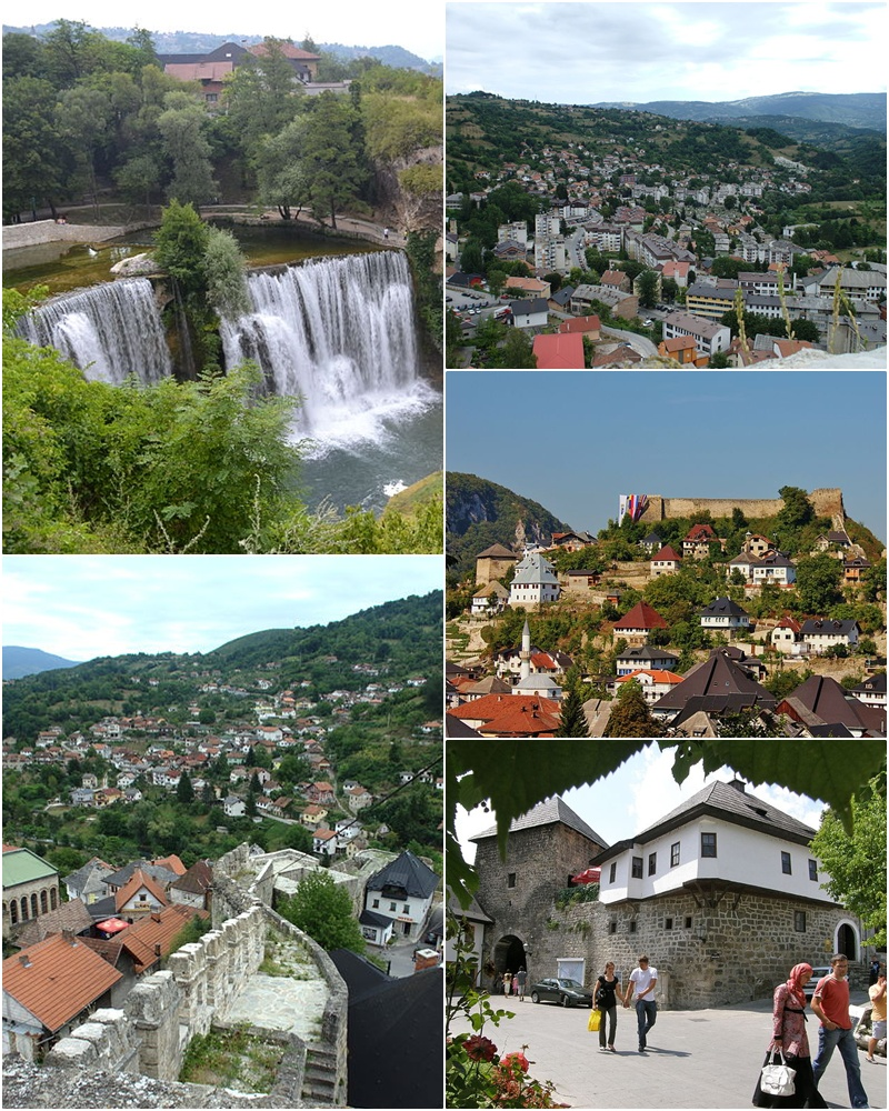 Jajce (kolaž)